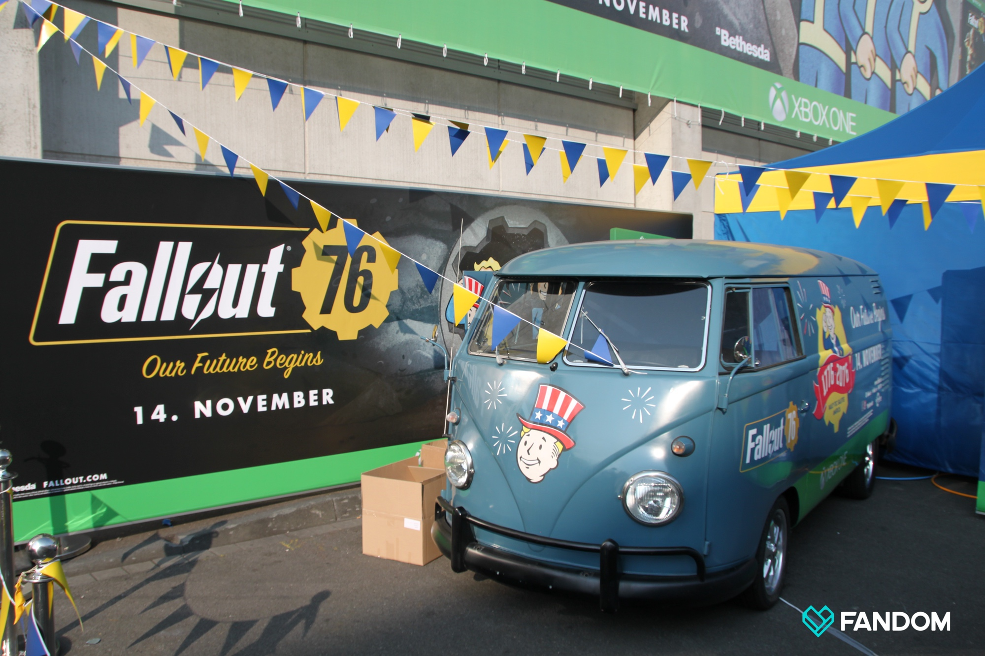 FANDOM für euch auf der gamescom unterwegs... Sonstige Neuigkeiten